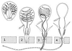 Жалячий нематоцист